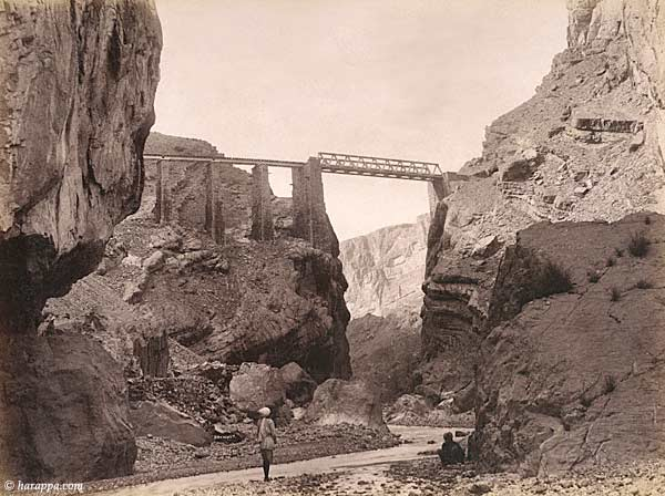 El puente sobre el Chapper Rift es una de las mayores obras de ingeniería del siglo XIX en las colonias británicas. Este puente permitía al tren de Sindh a Pishin pasar sobre un rift creado pocos siglos antes por un gran terremoto. Durante la construcción se usaron Elefantes para llevar maquinaria, y cientos de trabajadores que arriesgaban su vida ante la posible llegada de inundaciones por el rift en cualquier momento. Este puente se mantuvo en uso desde su construcción en 1880 hasta 1942, cuando unas inundaciones lo dejaron gravemente dañado. Dos años más tarde, los hierros se quitaron para ser usados en otros menesteres. Fotografía tomada por Fred Bremer.